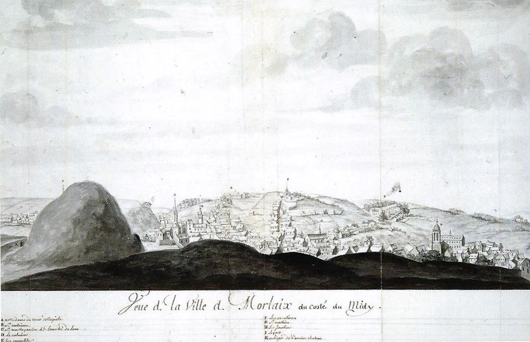 Vue générale de Morlaix (dessin en perspective de Christophe-Paul de Robien, dans"Description historique, topographique et naturelle de la Bretagne, enrichie de plans, cartes et dessins")